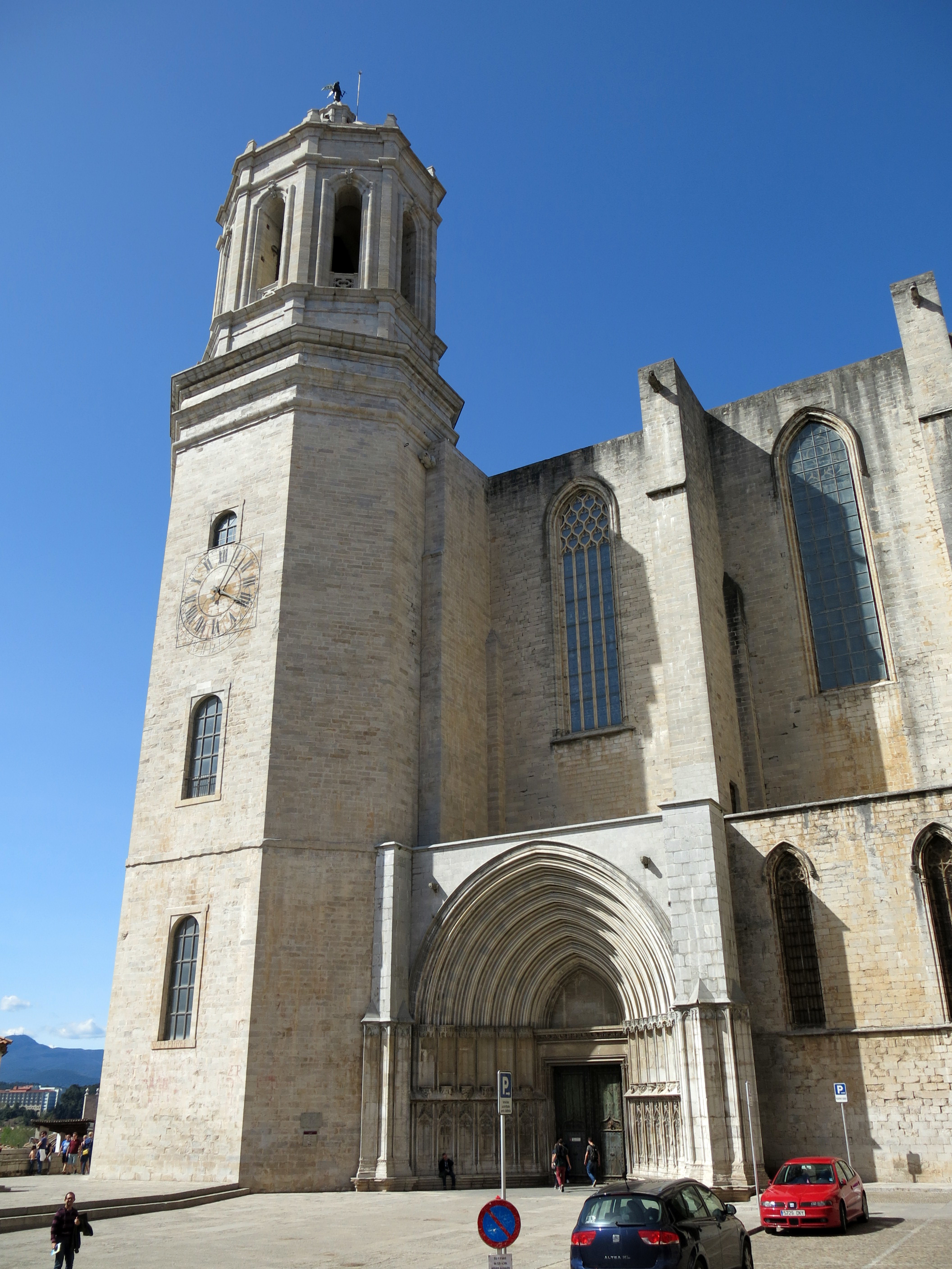 Catedral de Santa Maria (Girona).